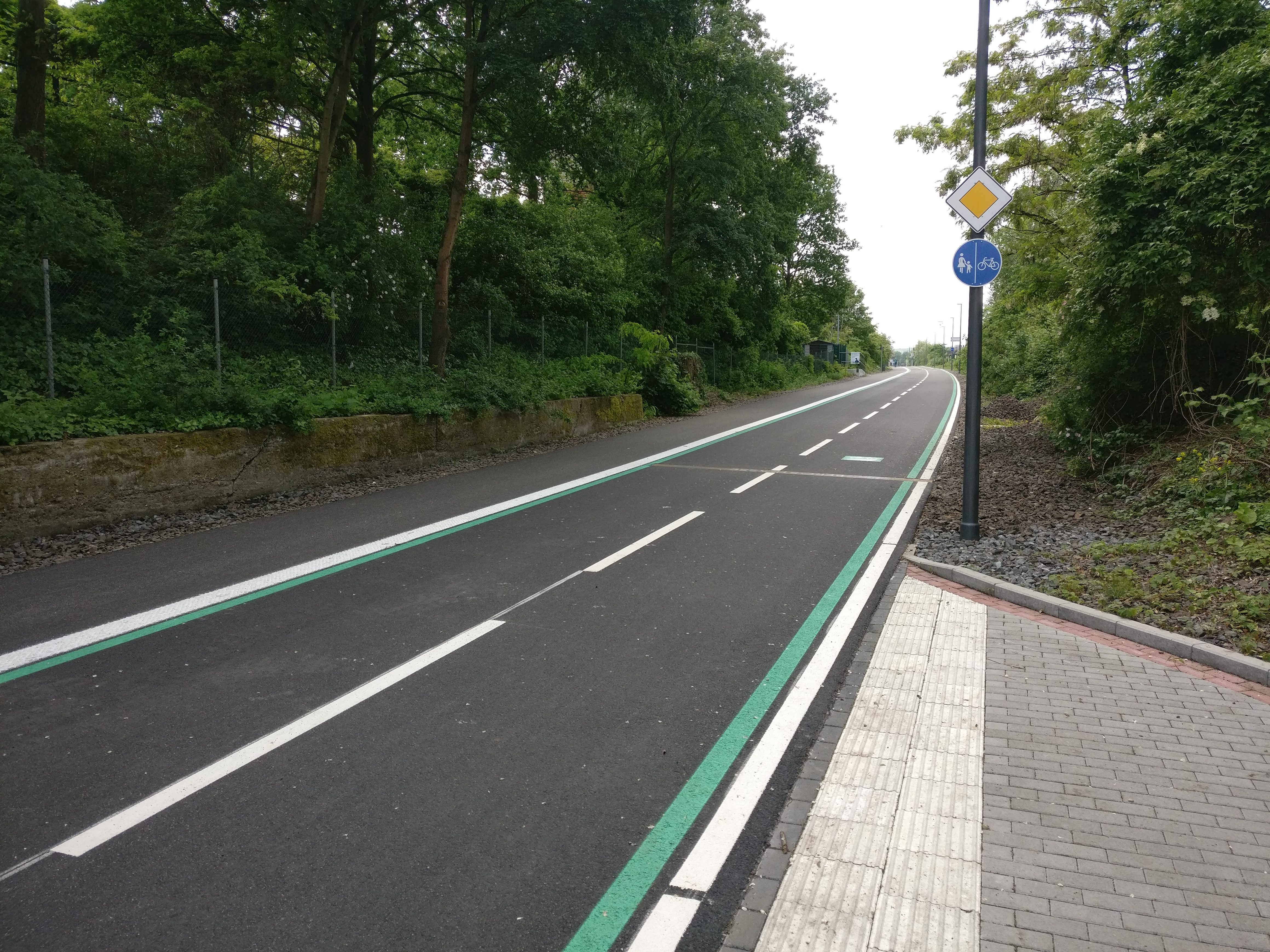 Radschnellweg Ruhr an einer Auffahrt in Mülheim.